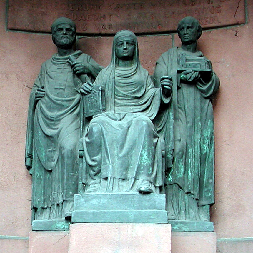 Schwanhildenbrunnen in Essen-Stoppenberg,Innenansicht